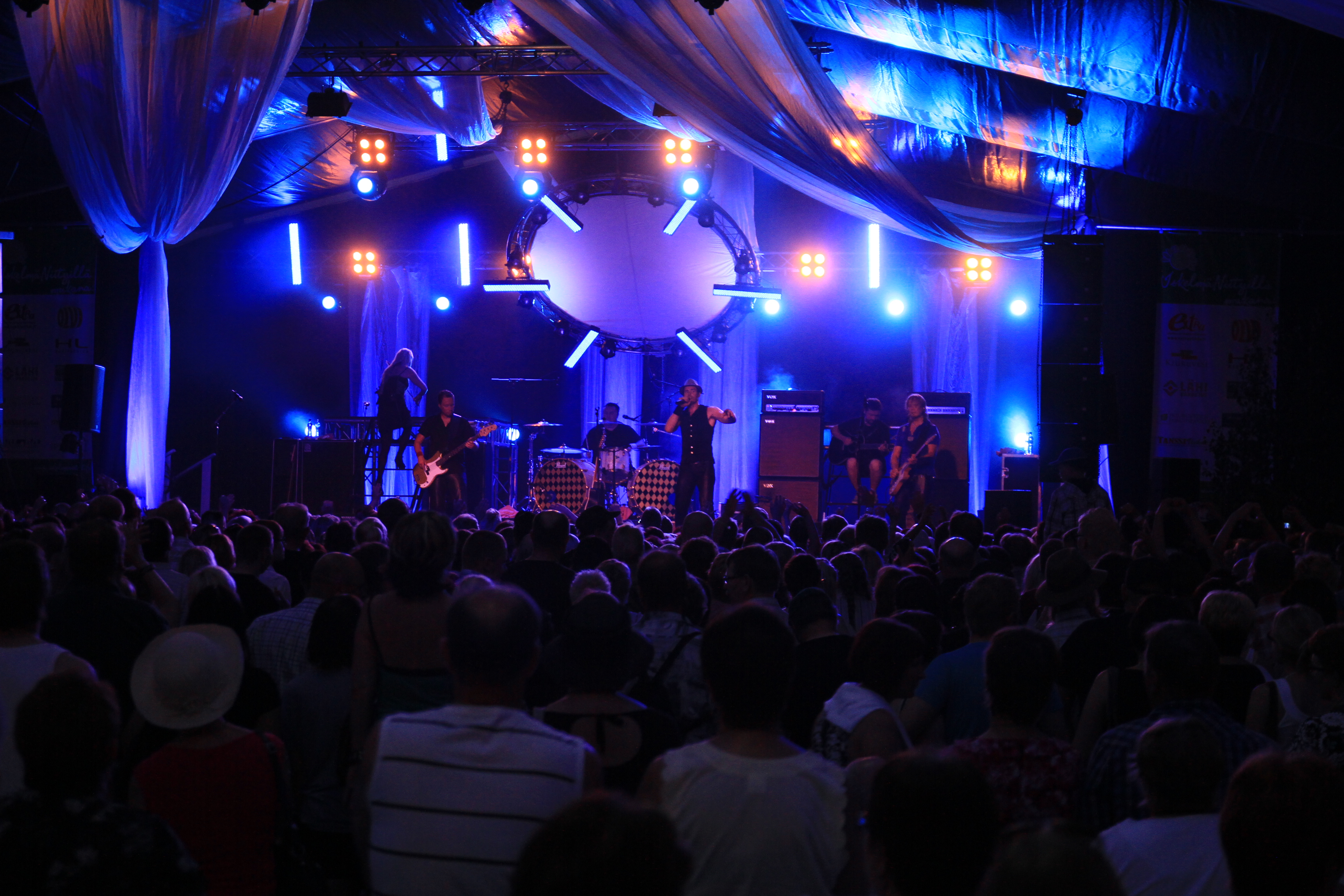 Lauri Tähkä & Elonkerjuu IskelmäNiityillä Kiuruvedellä kesällä 2010